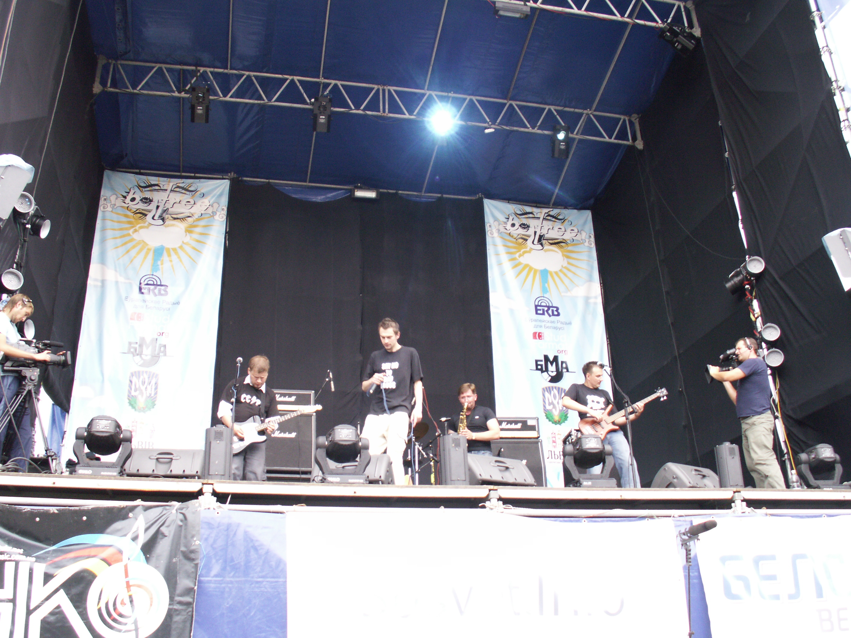 Беларуская (тарашкевіца): Выступ IQ48 на BeFree-2008, Львоў